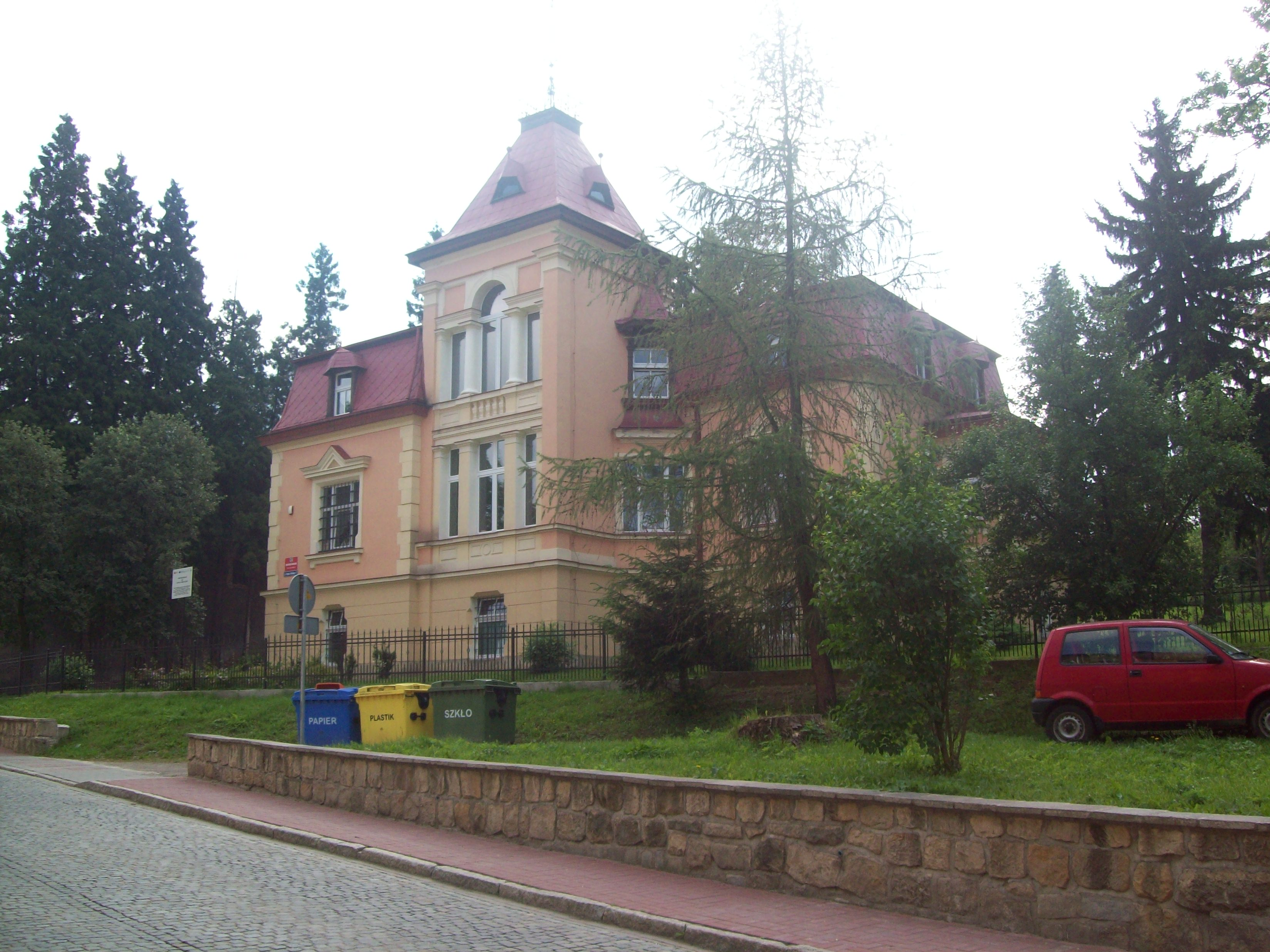 Międzylesie, ul. Wojska Polskiego 11 - willa, obecnie Miejska i Gminna Biblioteka Publiczna